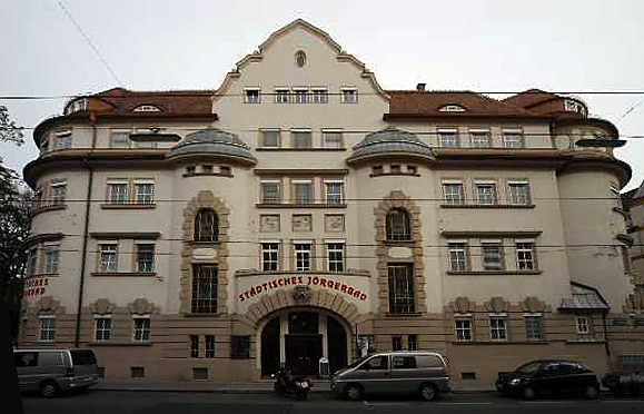 Joergerbad der Stadt Wien